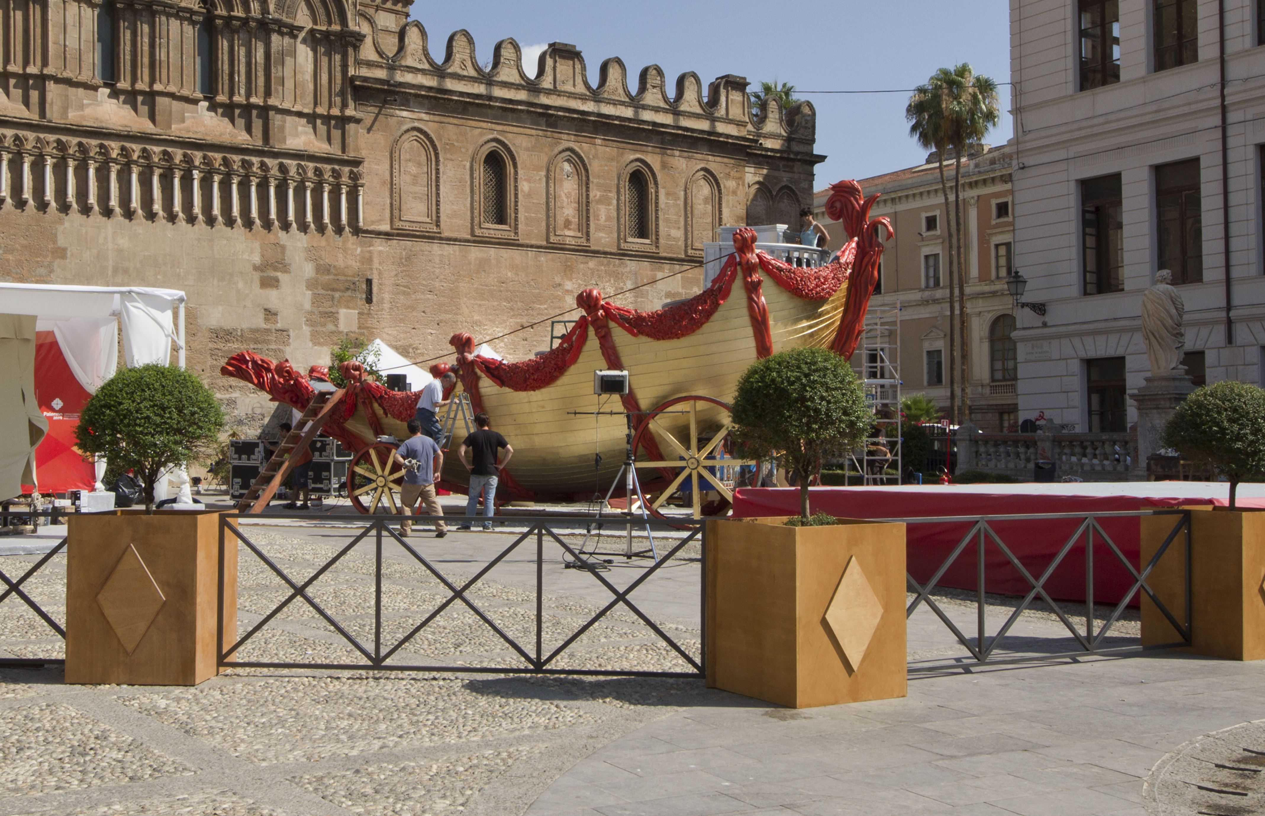 Festa di Santa Rosalia float, Monte di Pietà, Palermo, Sicily, Italy